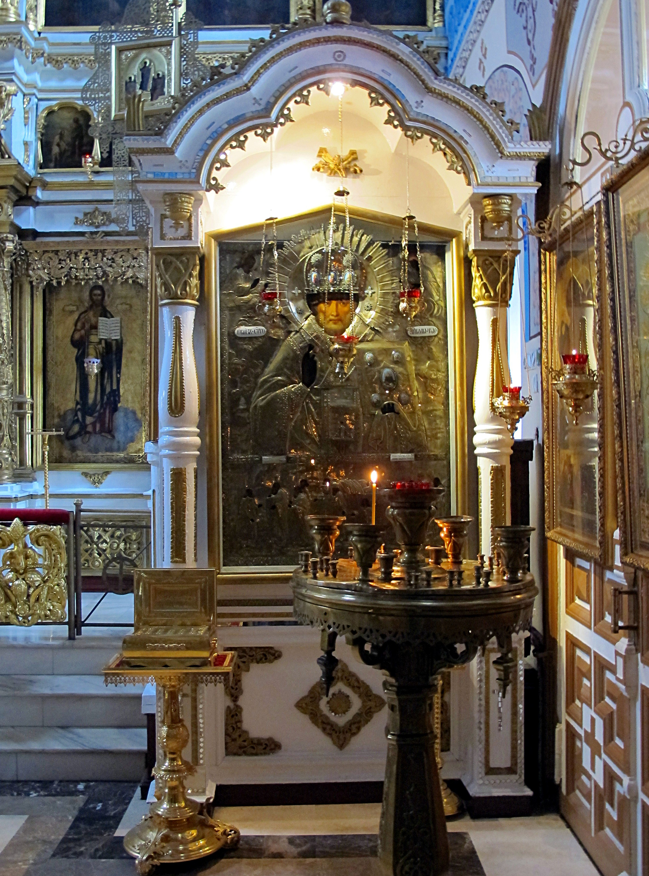 Икона Святого Николая Угодника в Храме Святых Апостолов Петра и Павла у Яузских ворот